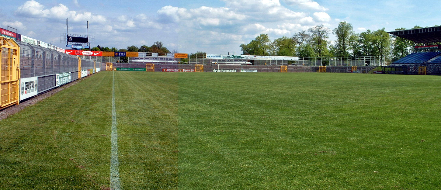 Stadion am Schönbusch, Aschaffenburg: Panoramaansicht. Rechts im Bild die Haupttribüne